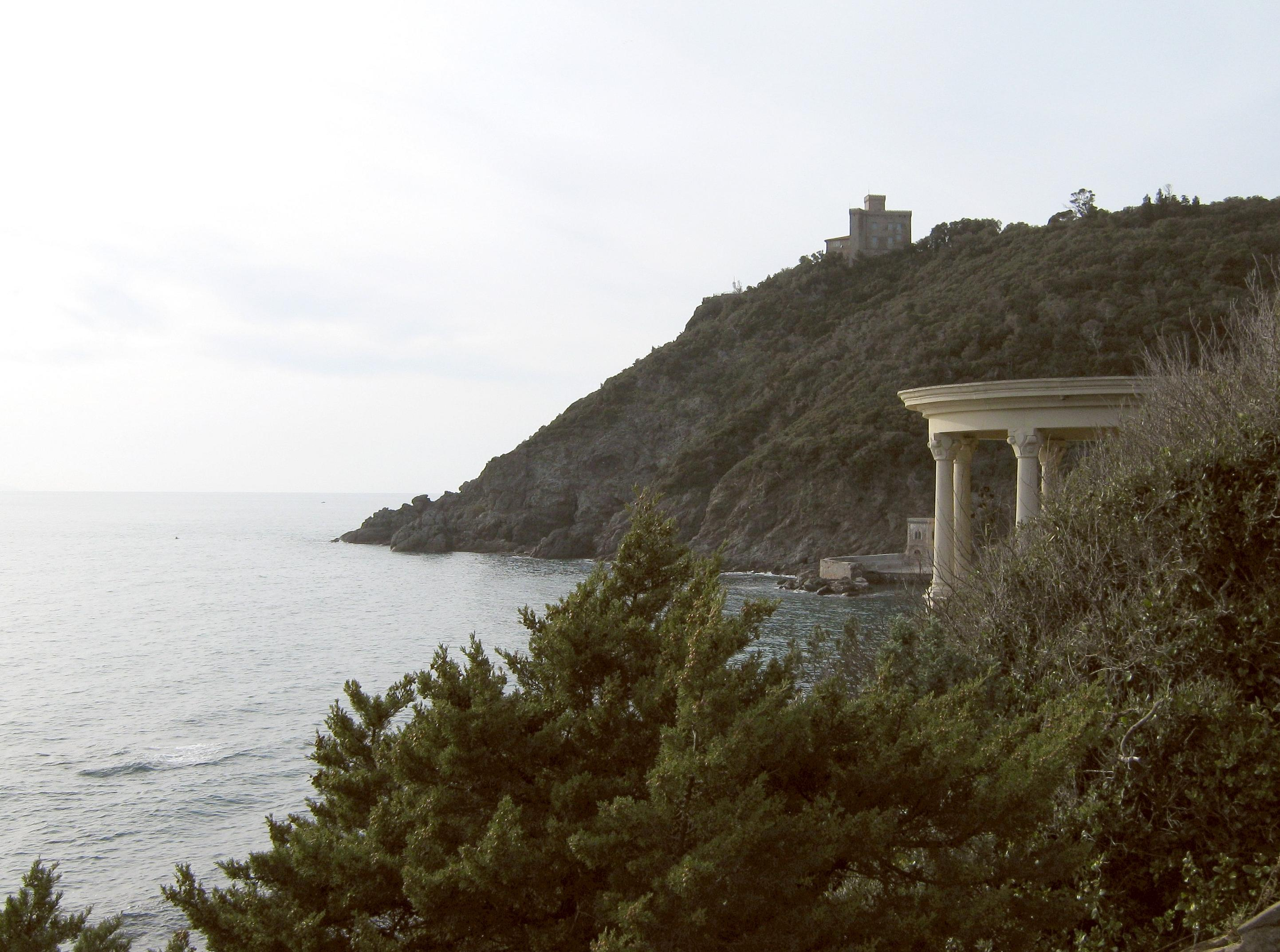 Quercianella, frazione di Livorno: veduta del Castello Sonnino. In primo piano, a destra, il gazebo di Villa Jana.